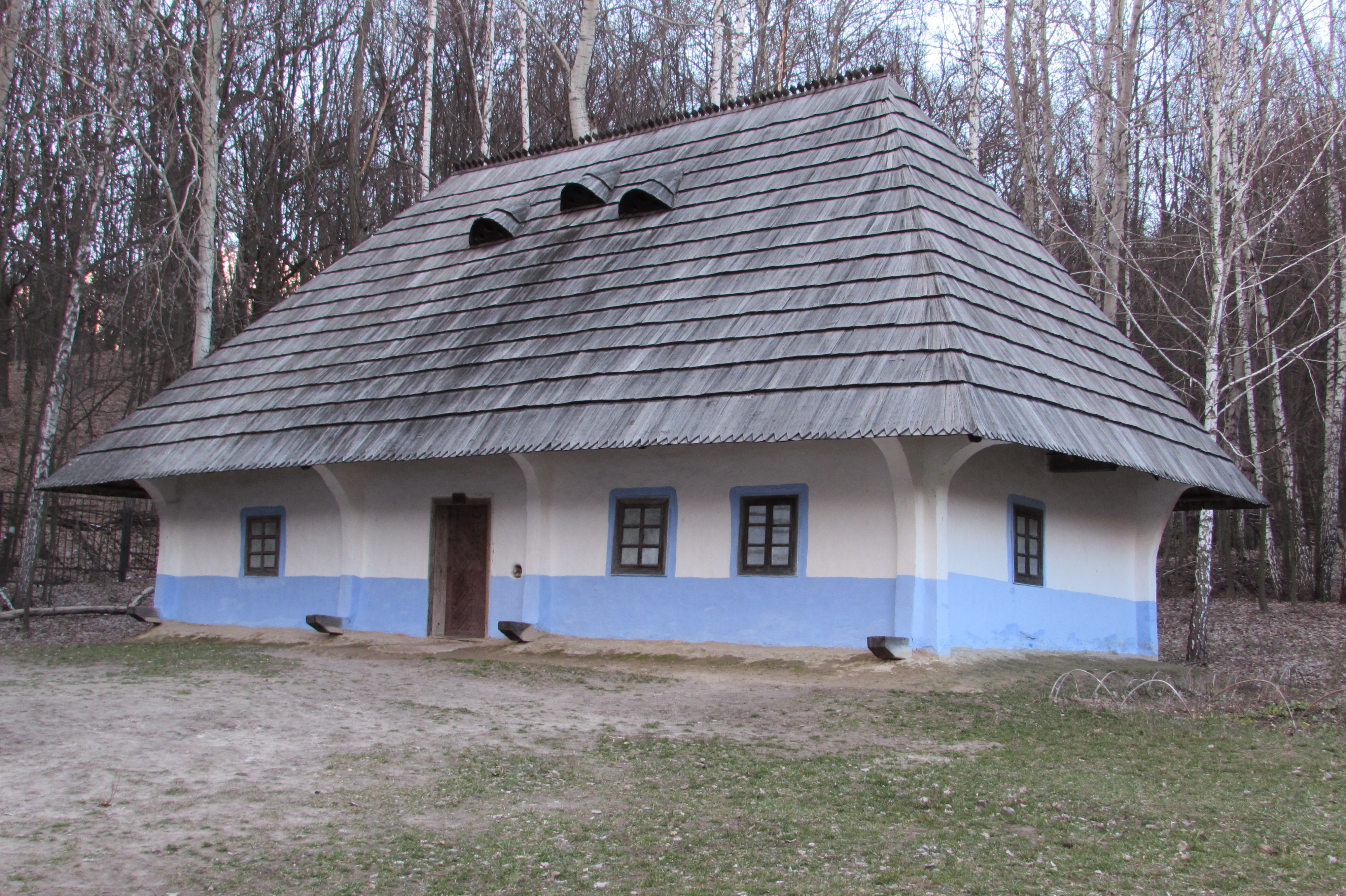 Хата з села Великий Кучурів Сторожинецького району Чернівецької області, Київ, Пирогів